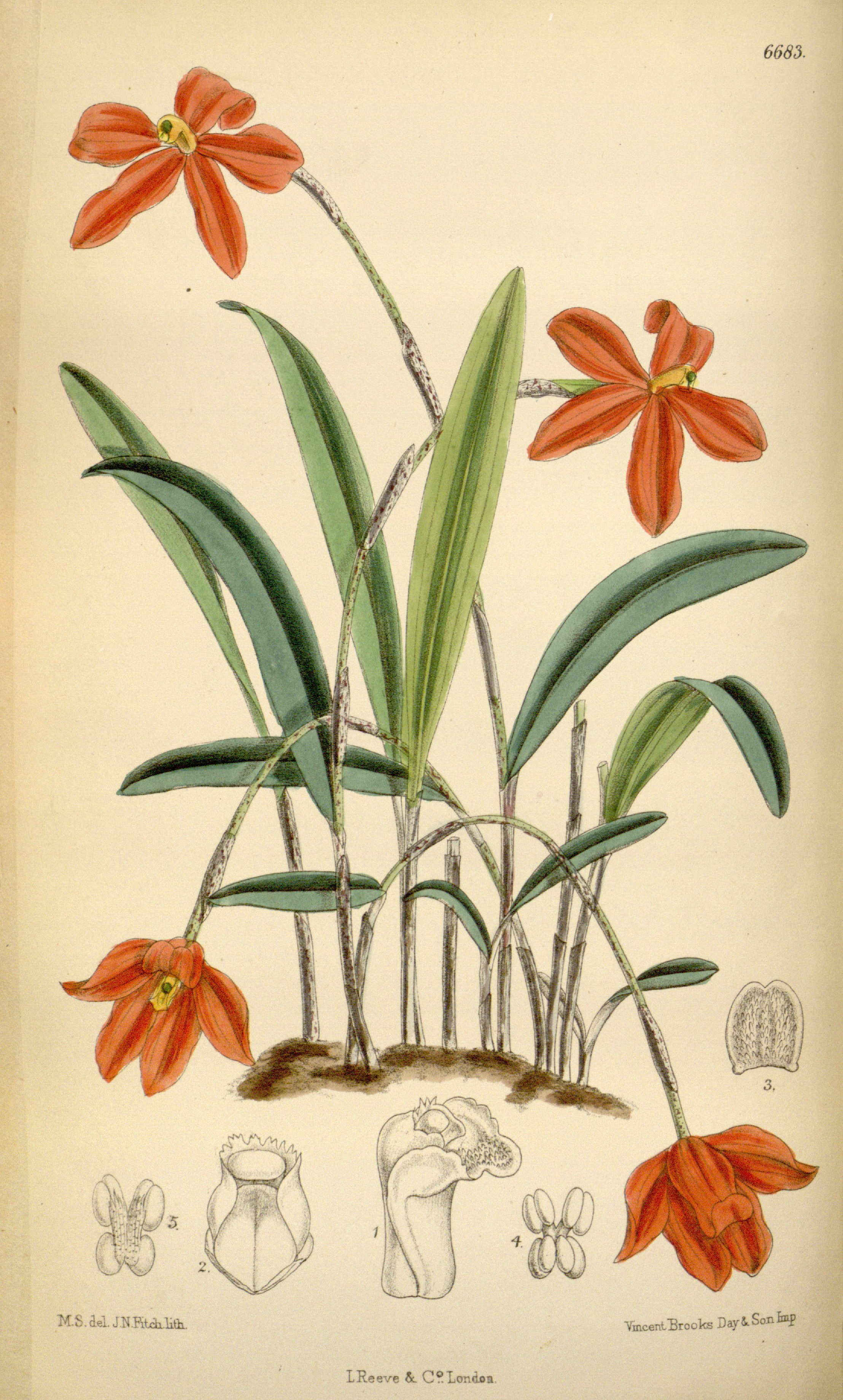 Illustration of Neocogniauxia monophylla (as syn. Laelia monophylla)